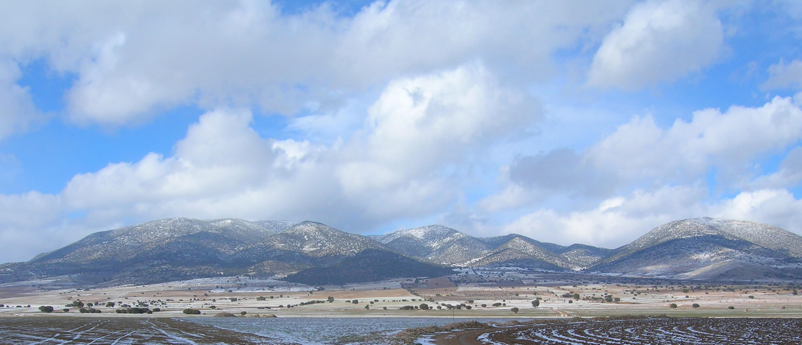 Macizo montañoso de Revolcadores, cumbre de la región de Murcia (2027 m). Se integra en el municipio de Moratalla; aquí se ve la cara sur, poco antes de llegar a Cañada de la Cruz. Fotografía propia, DP.